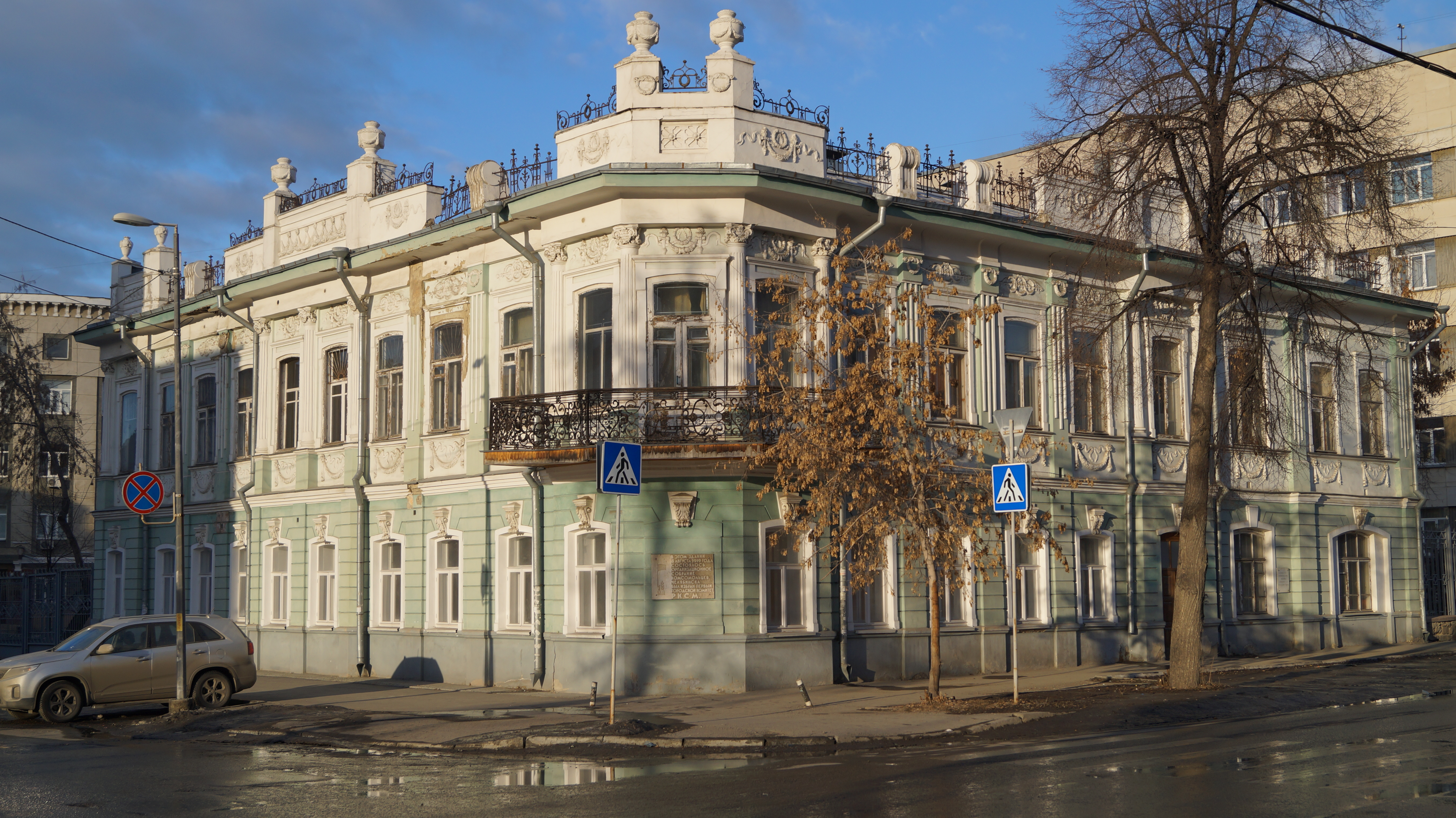 Особняк купца Архипова в Челябинске.